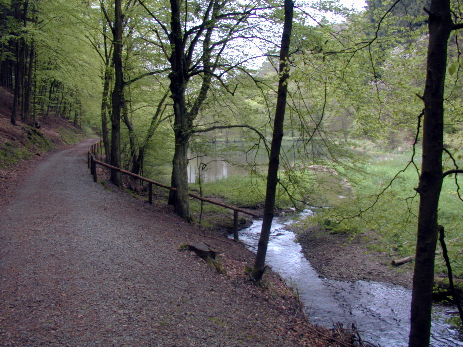 Stauteiche am Burgholzbach (Wuppertal) 2001 selbst fotografiert von Benutzer:Morty 20:30, 18. Dez 2005 . . Morty . . 1600 x 1200 (543124 Byte)